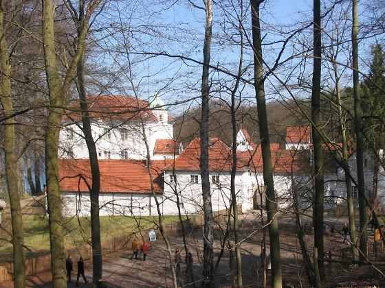 Jagdschloss Grunewald, Berlin.